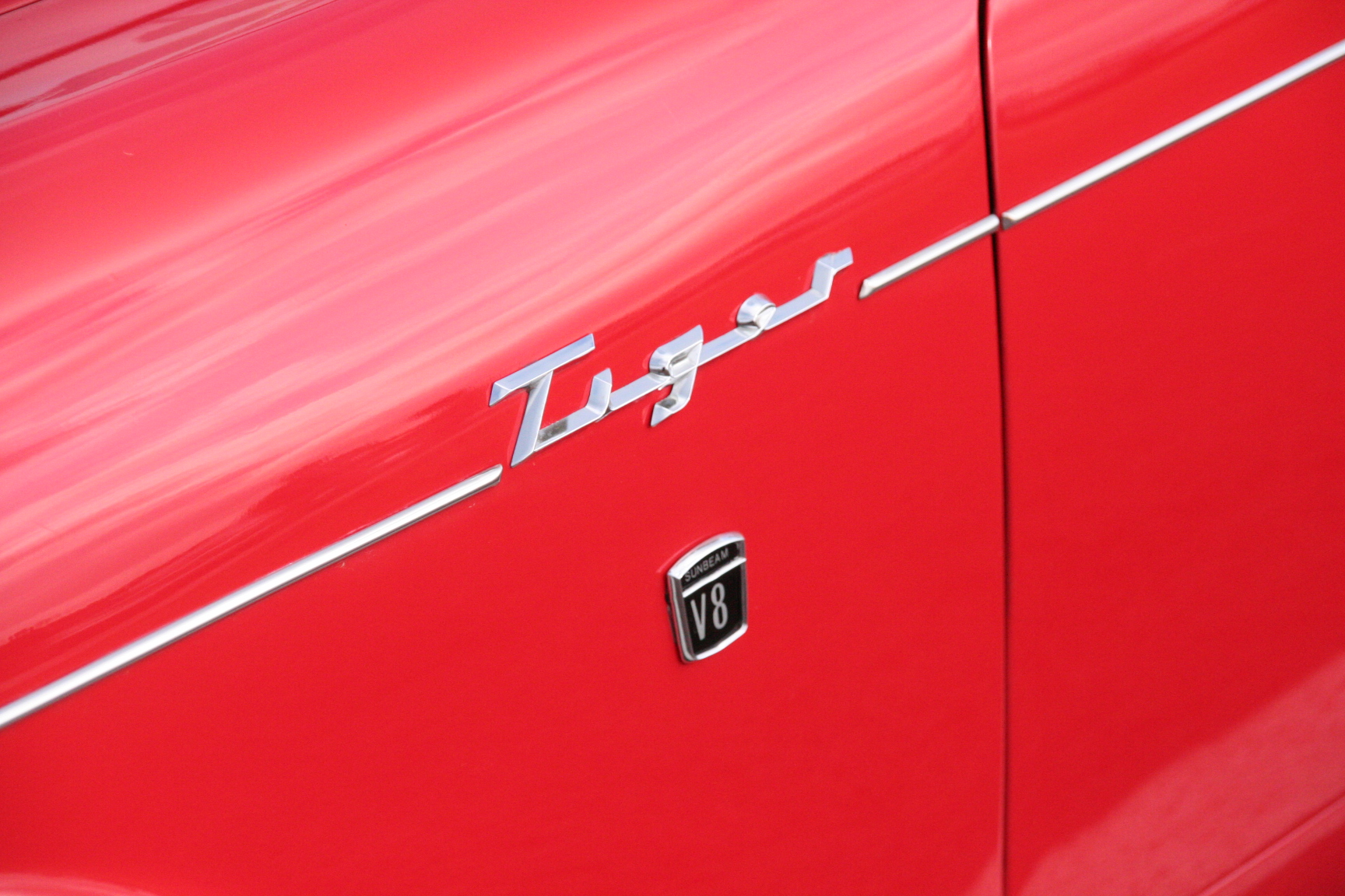 Sunbeam Tiger V8